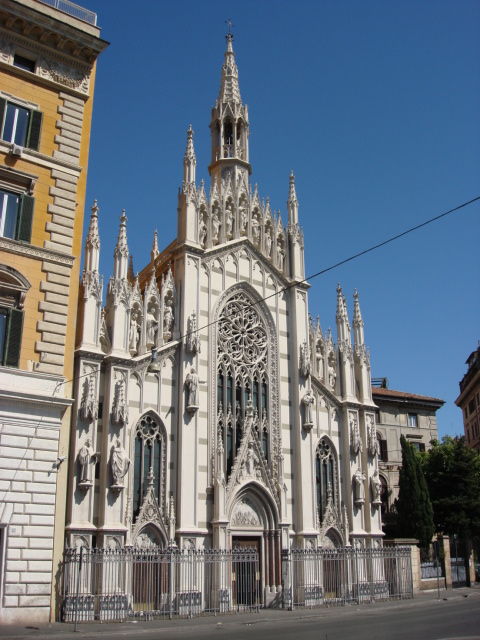 Chiesa del Sacro Cuore del Suffragio, a Roma.